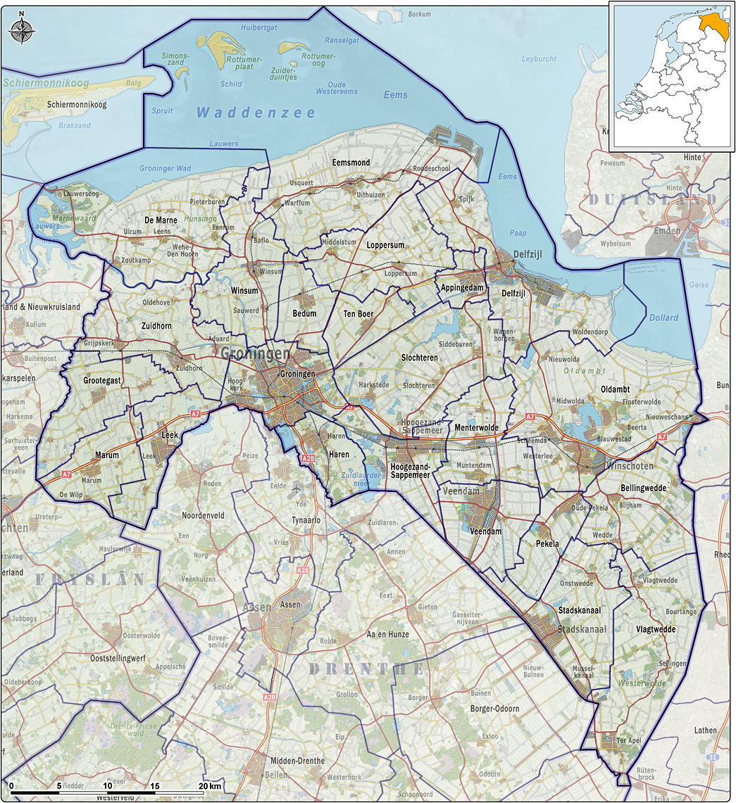 Kaart van de Nederlandse provincie Groningen, met gemeentegrenzen per 2012 en impressie van het landschap. Referentie-ondergrond (kustlijn, steden, wegen) gerasterd uit de OpenStreet Map OSM. Inhoud is beschikbaar onder de Creative Commons Attribution-ShareAlike 3.0 license. Referentie-ondergrond op water bewerkt vanuit Gebruik is vrij met bronvermelding NLR en ESA. Vectorgrenzen van gemeenten op basis van het vrij te gebruiken geo-bestand van het CBS. Hoogte-aanduidingen (reliëf) gerasterd uit de AHN Viewer ( gebruik is vrij met bronvermelding (c) AHN, Overige kenmerken op de kaart: eigen tekenwerk.